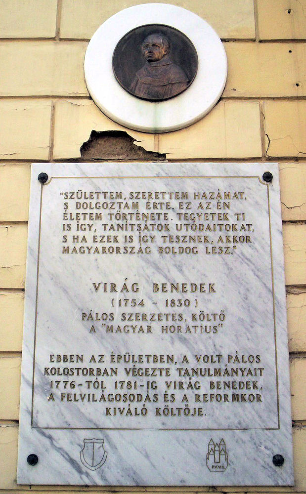 Virág Benedek emléktáblája Pécsett – photo taken by uploader User:Csanády in 2006.